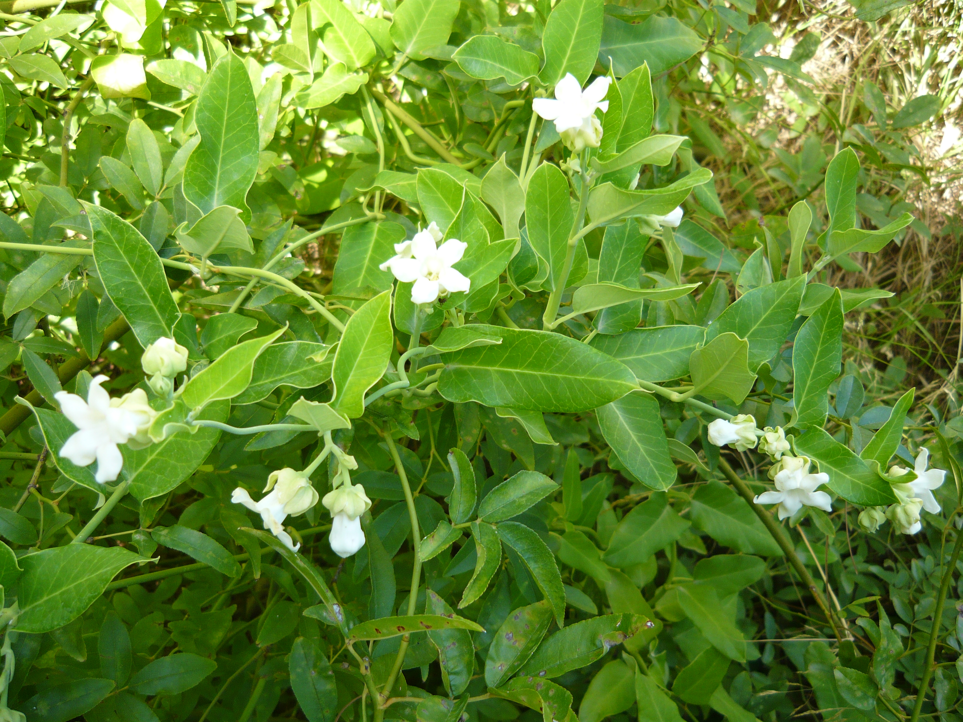 Araujia sericifera. Real Jardín Botánico de Madrid